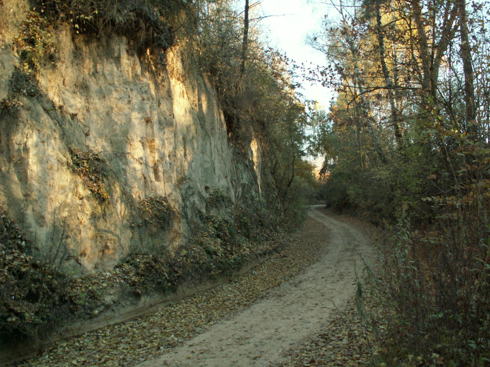 Wąwozy lessowe w Skowieszynie